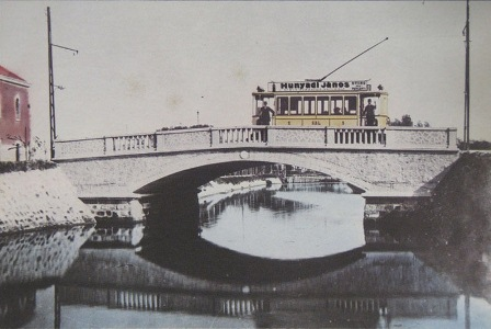 Lido di Venezia - Tram - 1908